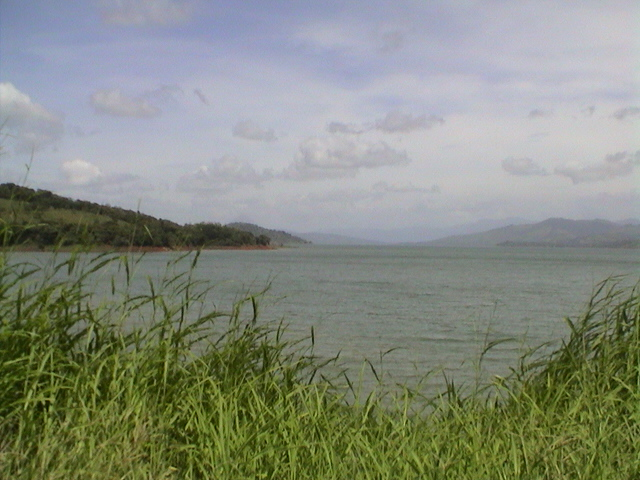 Lake Arenal, Costa Rica